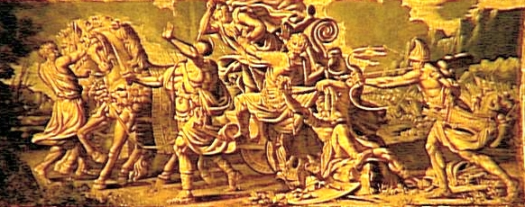 HARPALYCE, FILLE D'HARPALICUS RETIRE SON PÈRE ENTRE LES MAINS DE SES ENNEMIS ; Salon : Antichambre de la reine, Grands appartements du Château de Versailles Emplacement : vousseur ; sud (ouest)